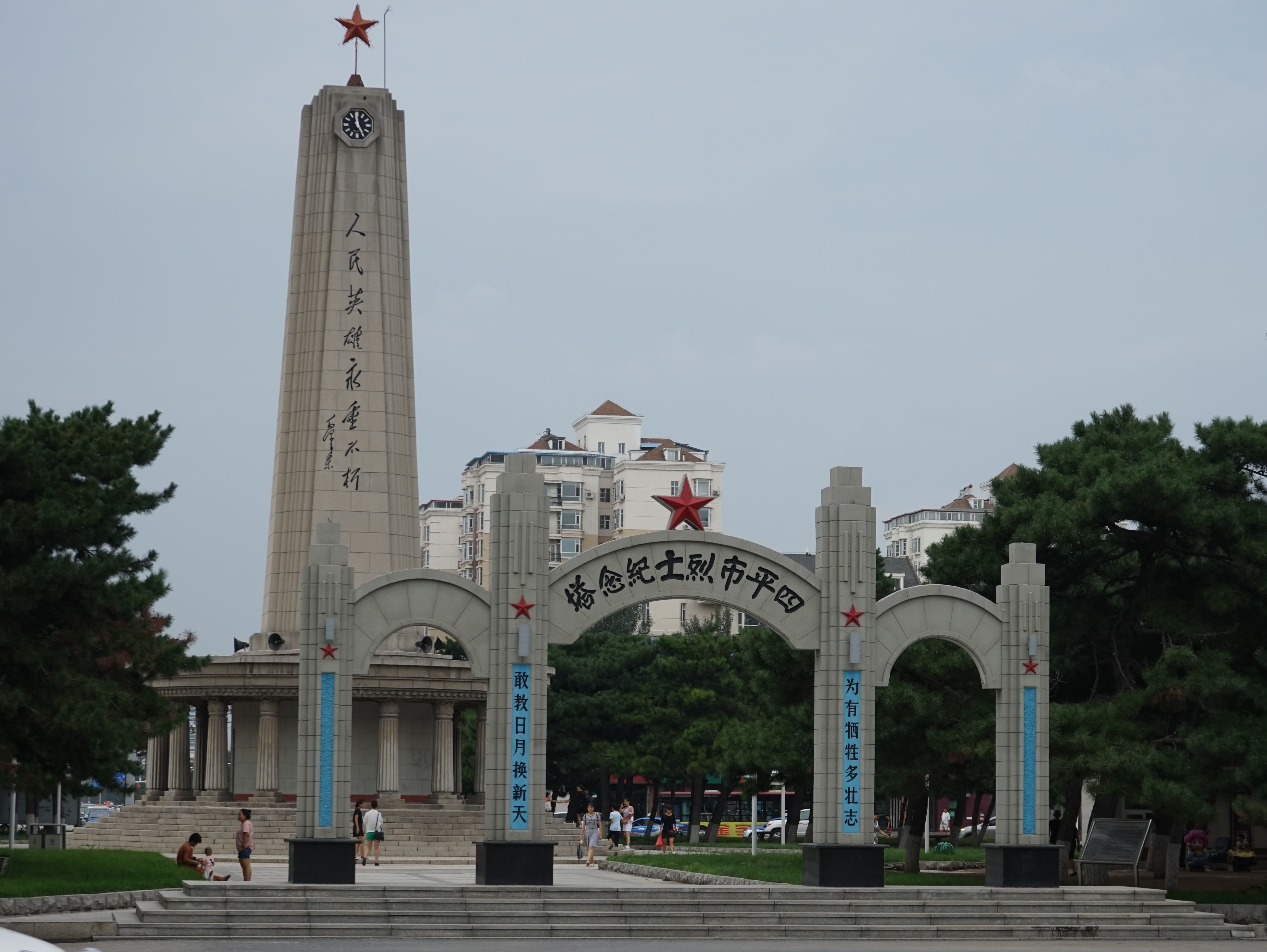 中文（中国大陆）: 四平烈士纪念塔